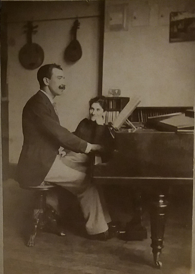 Portrait de Georges Martin Witkowski avec sa femme, autour de 1896. Fonds de l'Association Georges Martin Witkowski.